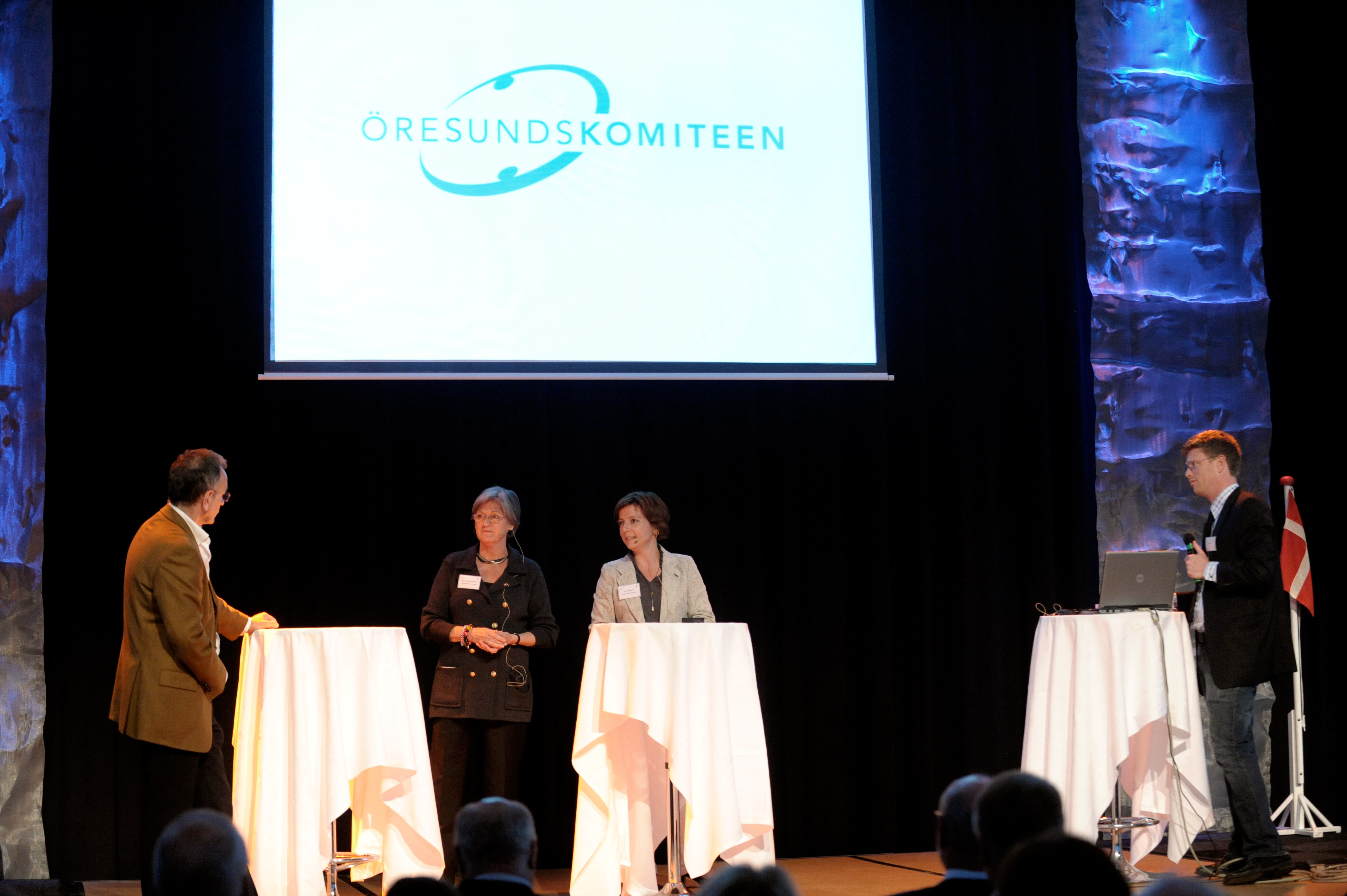 Cristina Husmark Pehrsson, nordisk samarbetsminister sverige och Karen Ellemann, Danmarks miljöminister och minister för nordiskt samarbete på Öresundstinget i Malmö 28 maj 2010.